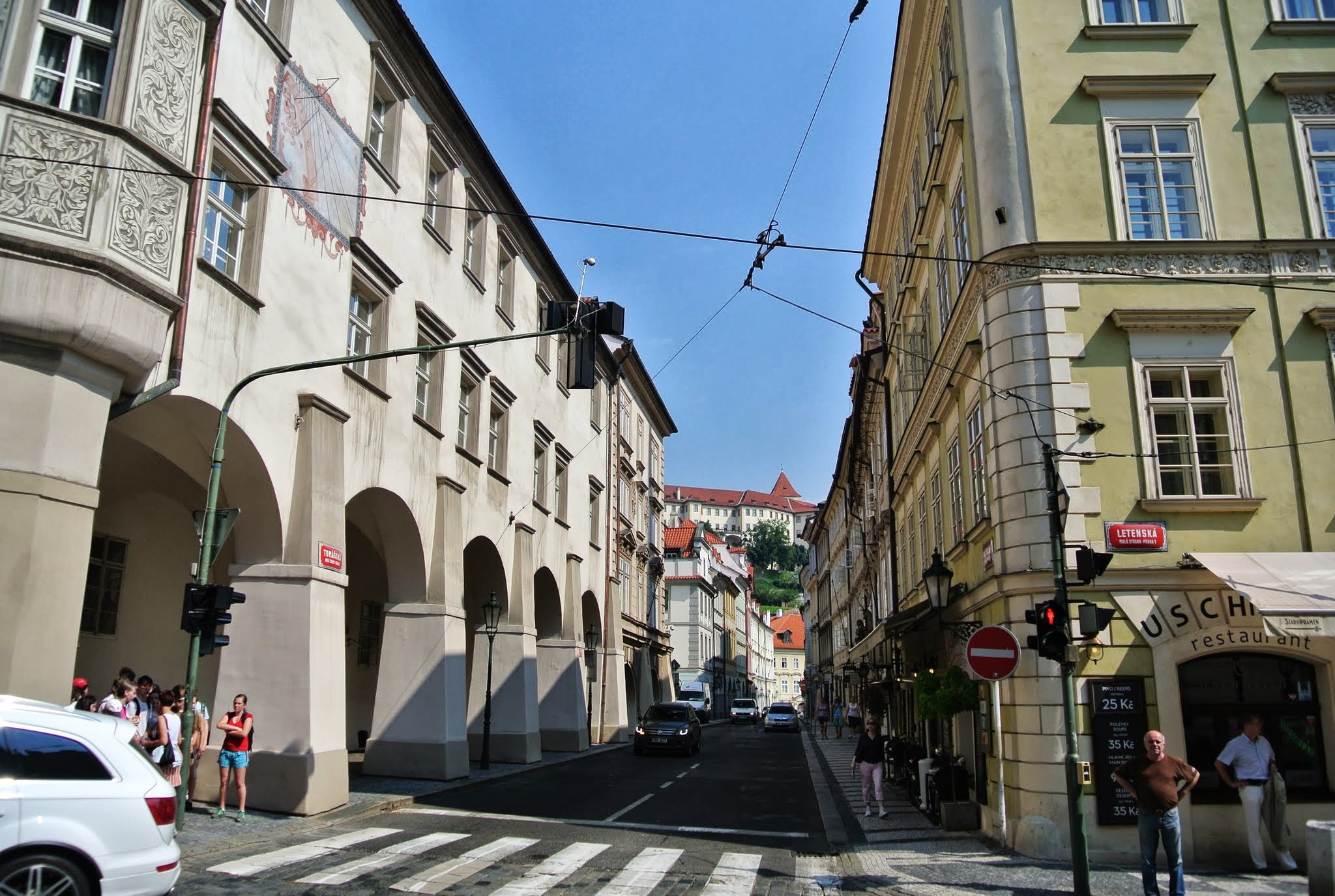 Malá Strana, Prague 1, Czech Republic